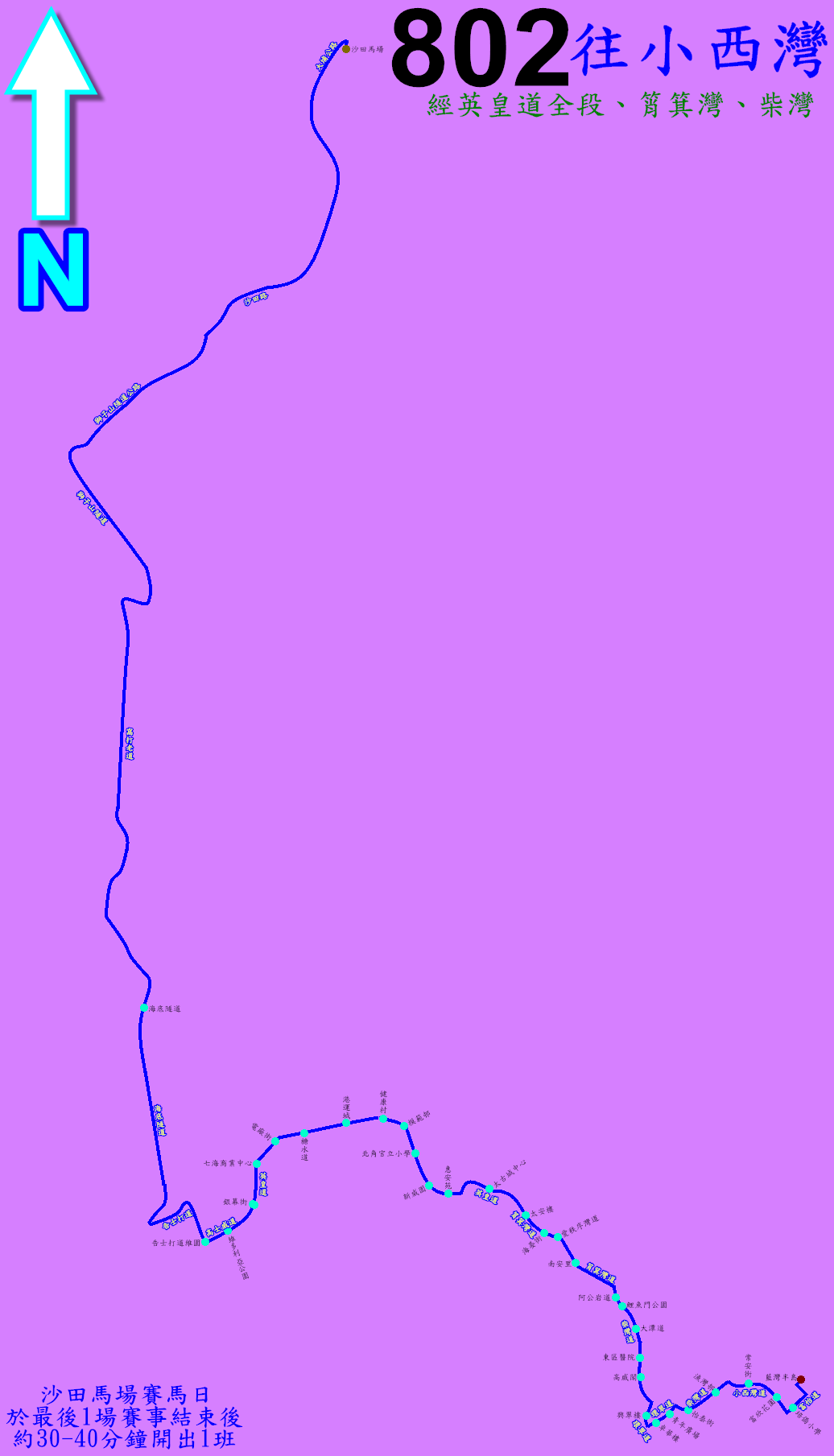 中文（香港）: 馬場巴士802線的走線圖